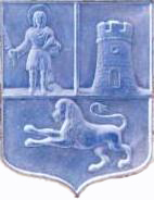 Blazono de Kotor.